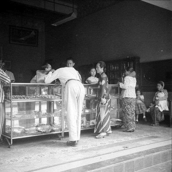 Negatief. Een goudsmidwinkel op de markt 'Pasar Baru' te Bandung, West-Java